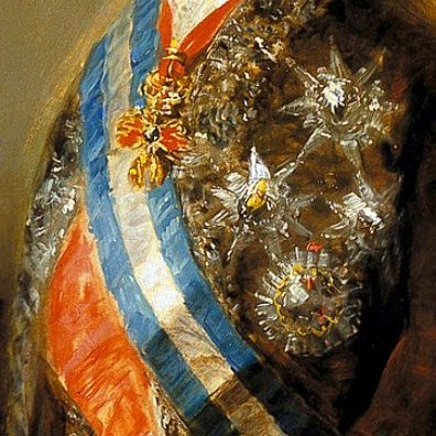 Detalle de las condecoraciones de Carlos IV, La Familia de Carlos IV